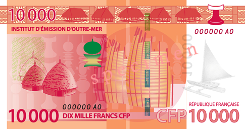 Billet en francs Pacifique (série de 2014)